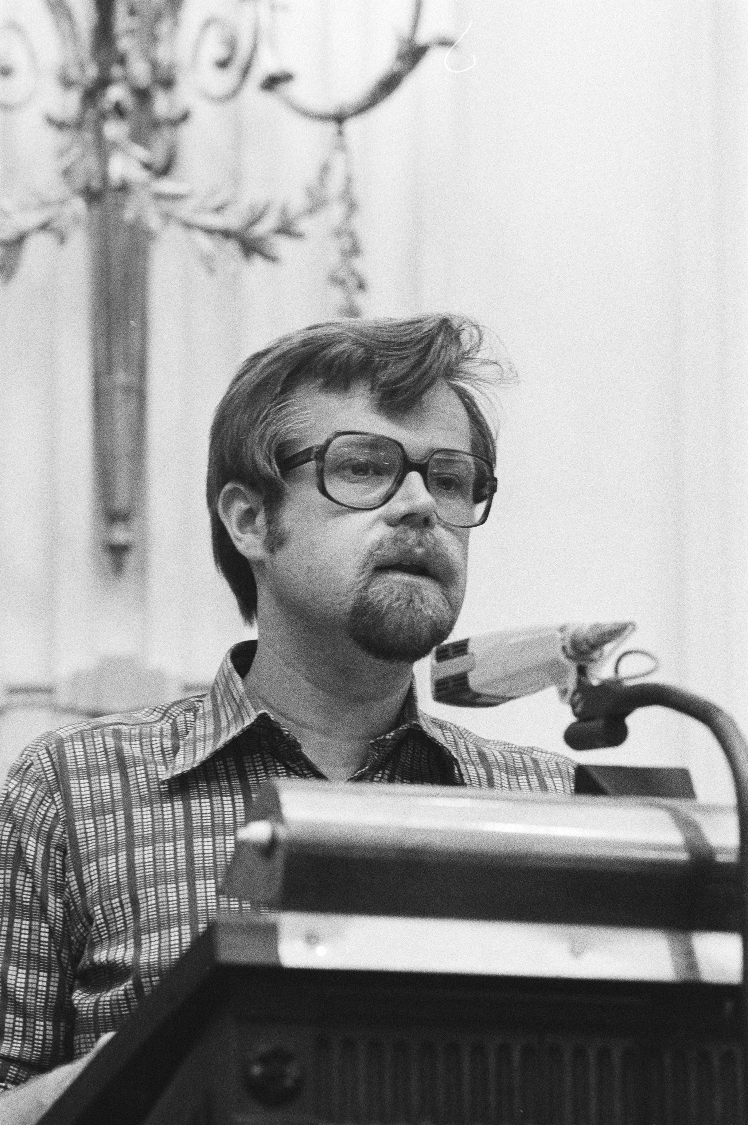 Collectie / Archief : Fotocollectie Anefo Reportage / Serie : Behandeling belastingfraudes in Tweede Kamer Beschrijving : De Graaf (PvdA) Annotatie : Negatiefrandnummers 7A, 8A en 9A Van der Stee Datum : 3 september 1980 Locatie : Den Haag, Zuid-Holland Trefwoorden : belastingen, fraudes, parlementaire debatten, politiek Persoonsnaam : Graaf, Arie de Fotograaf : Dijk, Hans van / Anefo Auteursrechthebbende : Nationaal Archief Materiaalsoort : Negatief (zwart/wit) Nummer archiefinventaris : bekijk toegang 2.24.01.05 Bestanddeelnummer : 930-9966